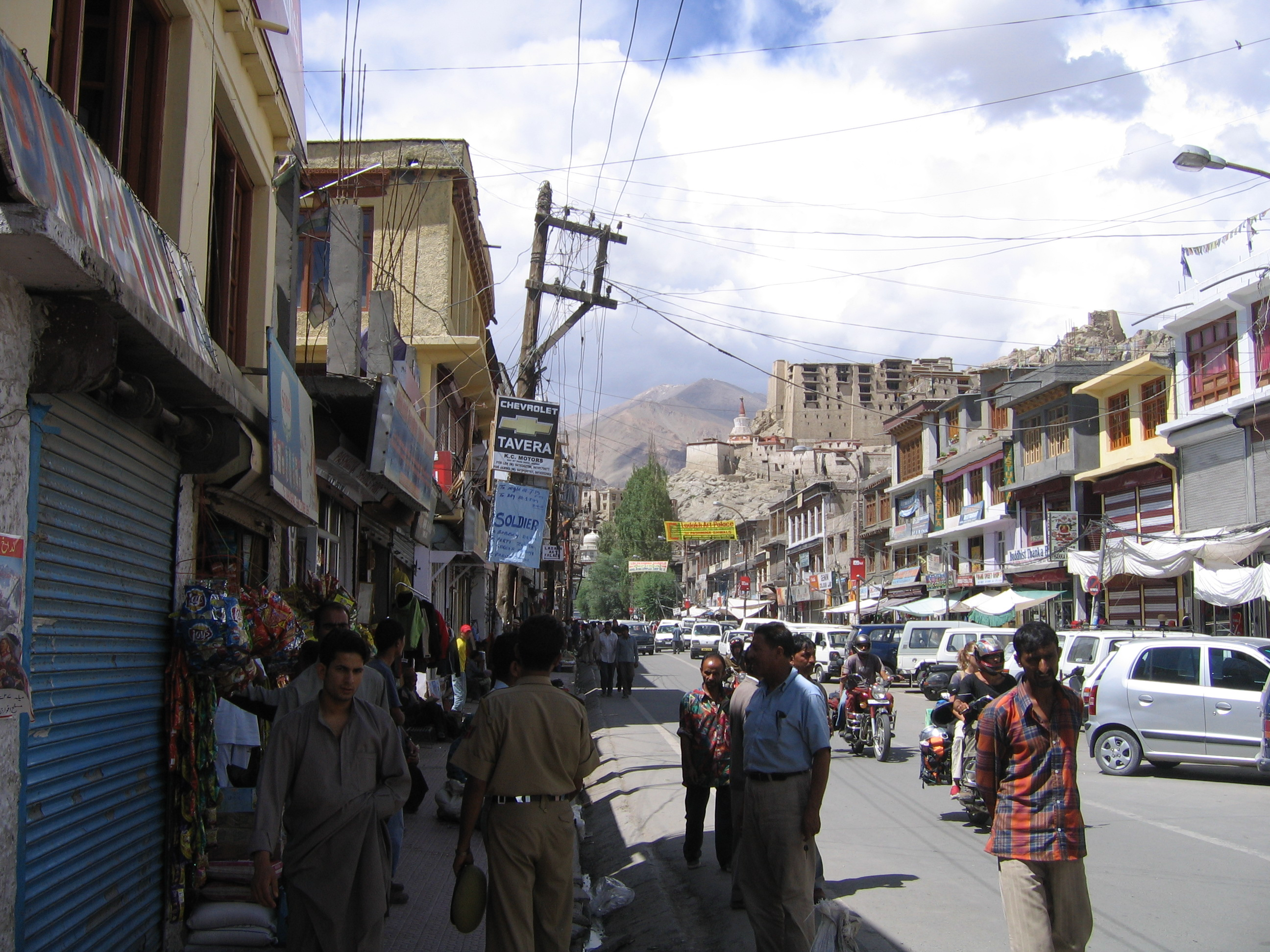 Leh Old Market